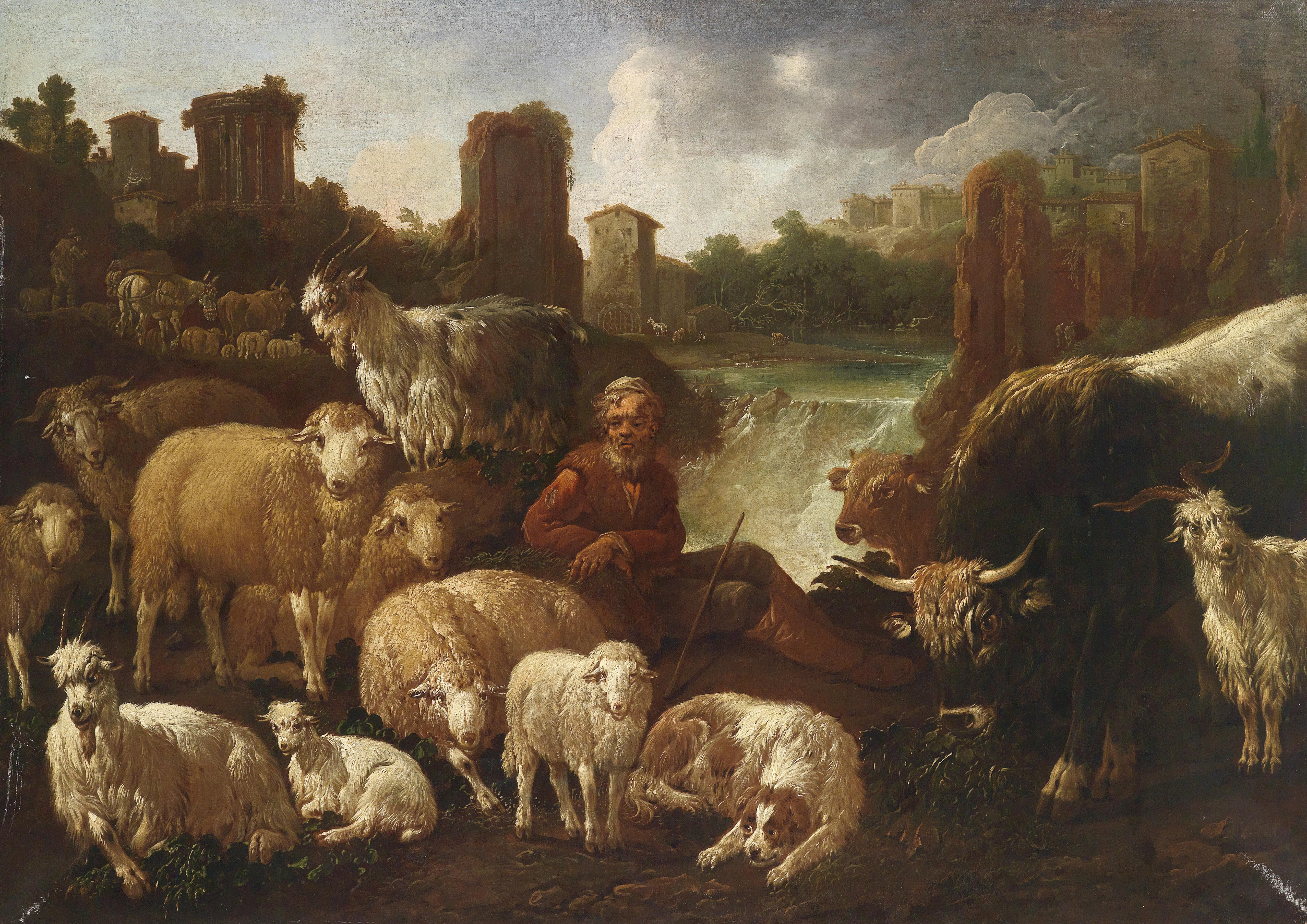 Hirten und ihre Herde